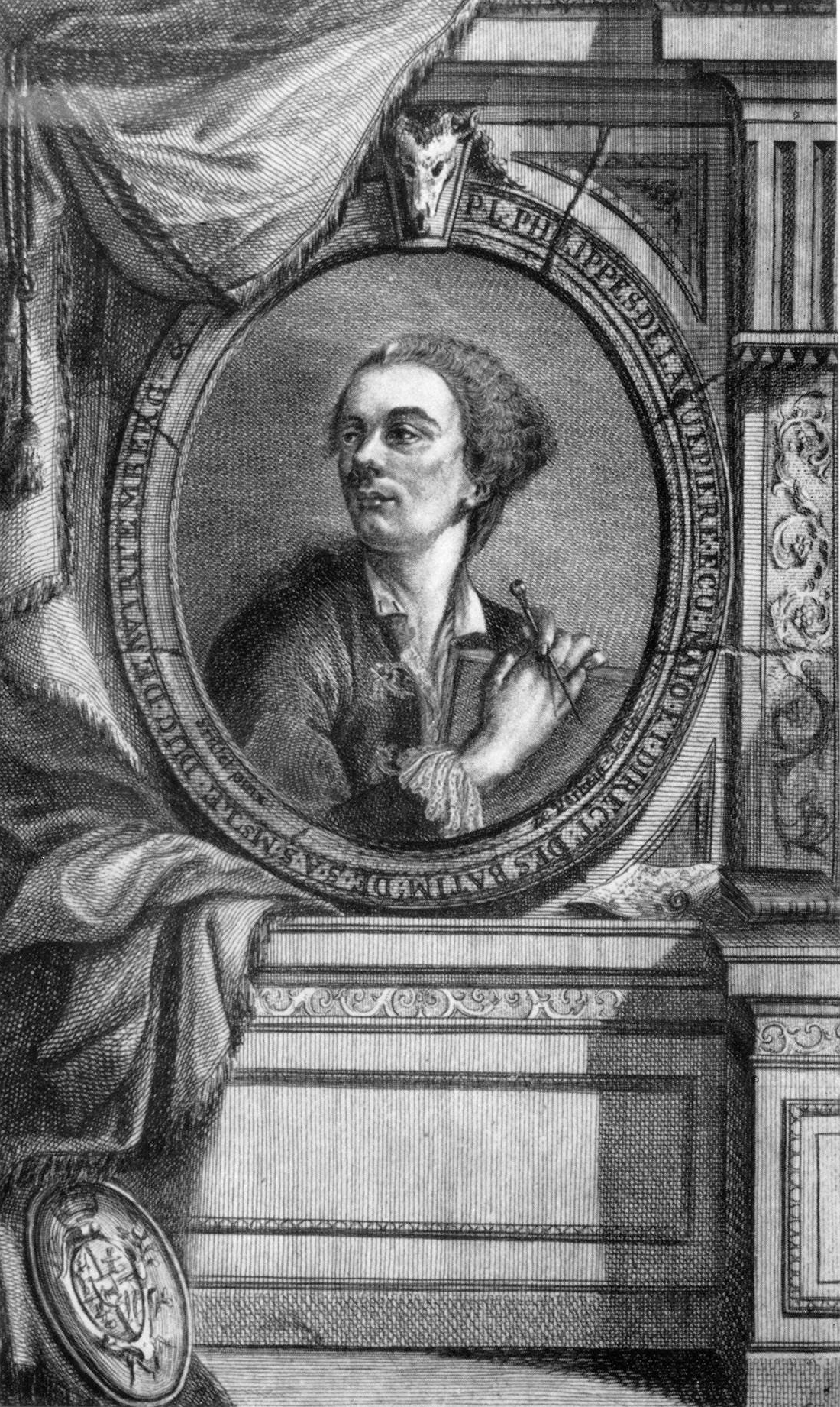 Porträt von Philippe de La Guêpière.